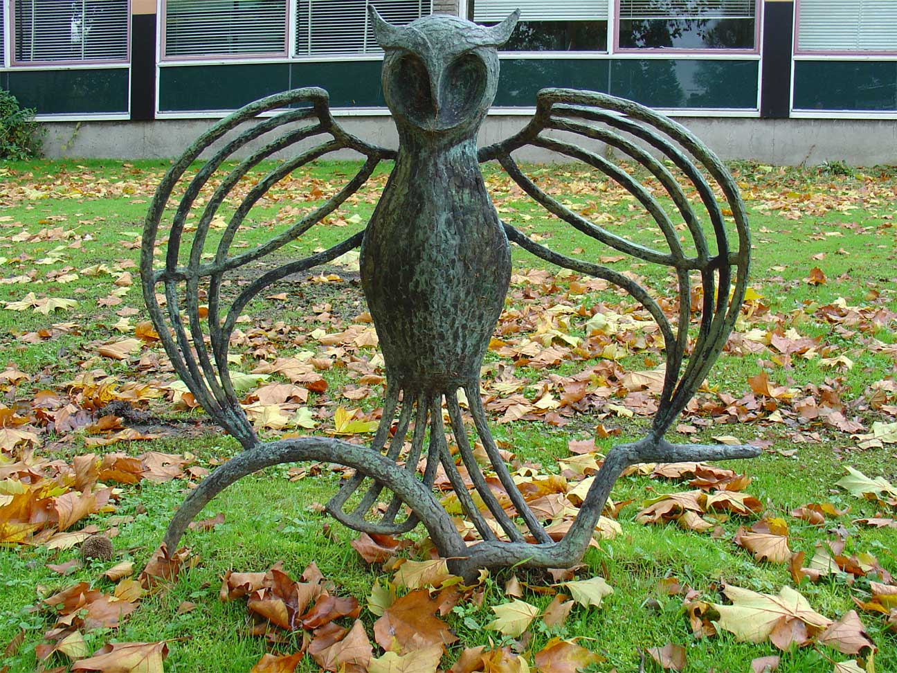 Uiltje (brons, 1970) door Sonja Meijer - Sportlaan Gouda. In 2012 is het verplaatst naar de tuin bij het Monreauhof in Gouda. De school waar het uiltje voor stond, werd afgebroken.